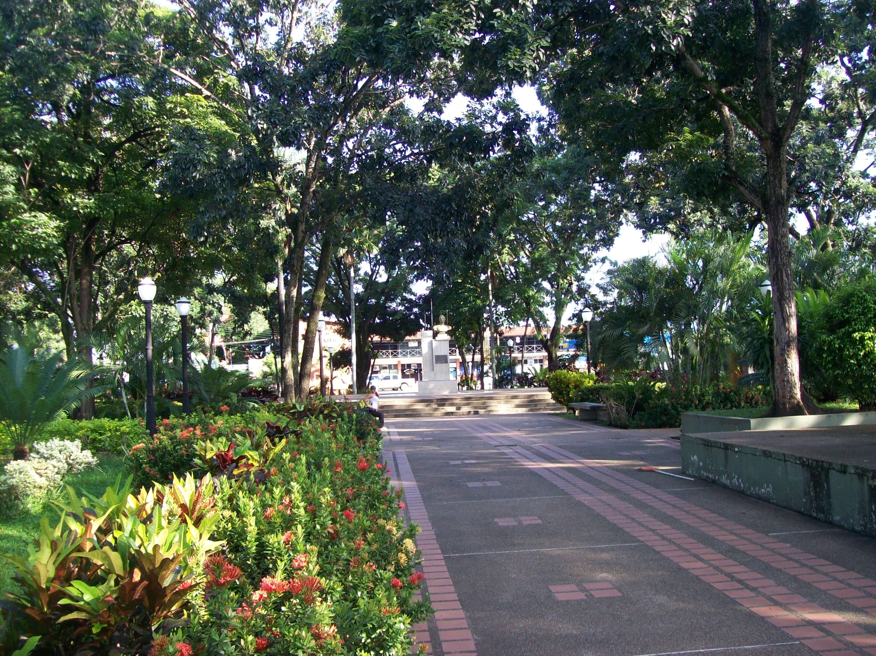 Plaza General Ezequiel Zamora, Barinas, Venezuela.